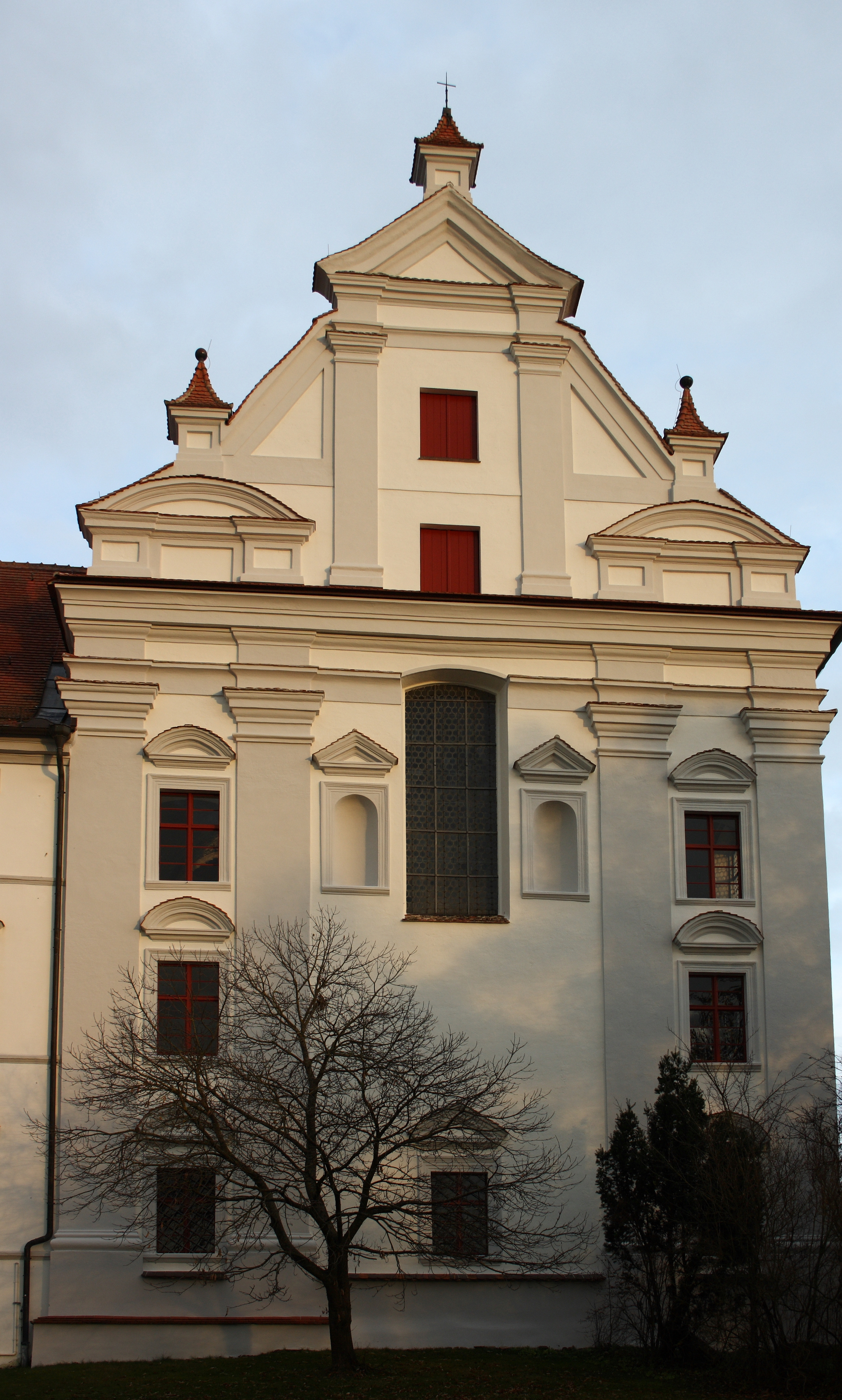 Ehemalige Damenstiftskirche, katholische Pfarrkirche St. Johannes Baptist und Johannes Evangelist in Edelstetten in der Gemeinde Neuburg an der Kammel im Landkreis Günzburg (Bayern), Westfassade